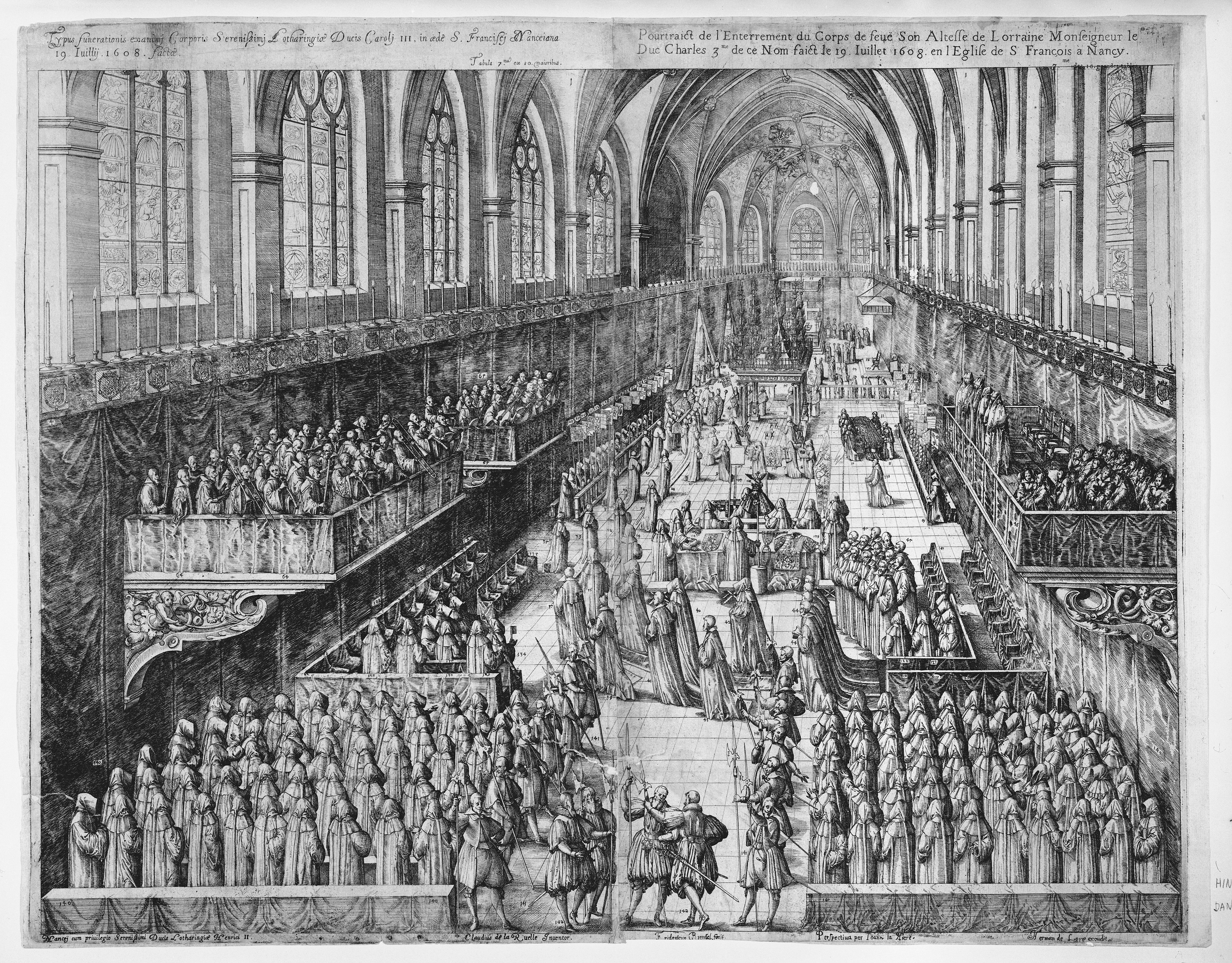 Book; Books